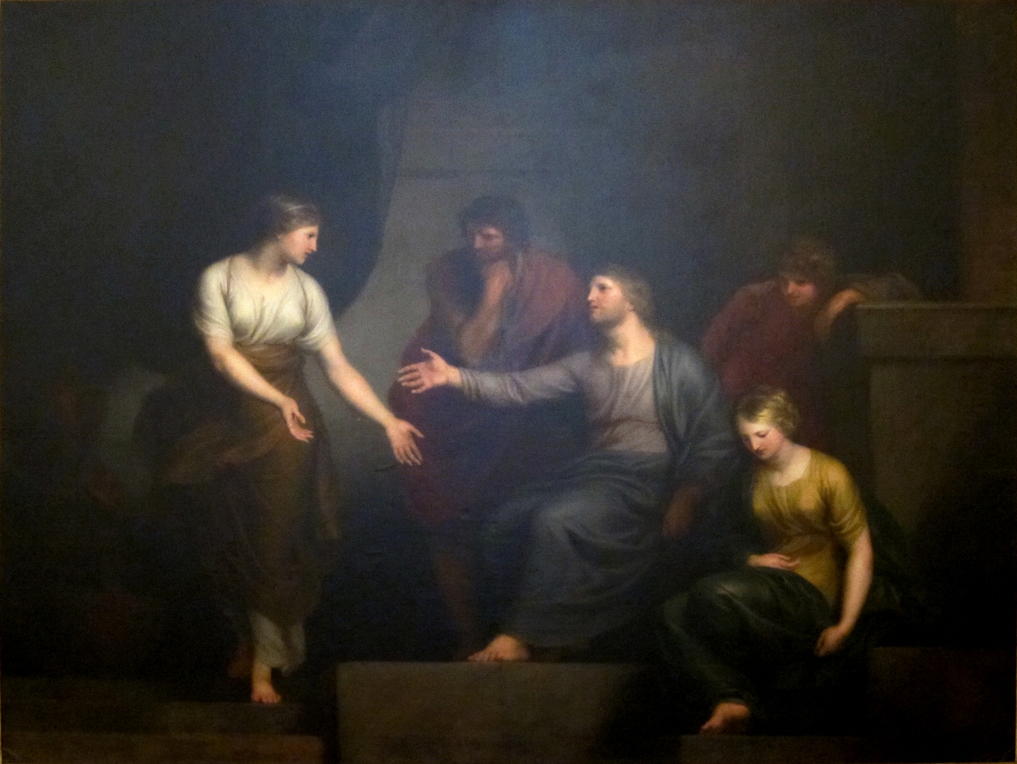 Madeleine convertie écoutant notre seigneur chez Marthelabel QS:Lfr,"Madeleine convertie écoutant notre seigneur chez Marthe"